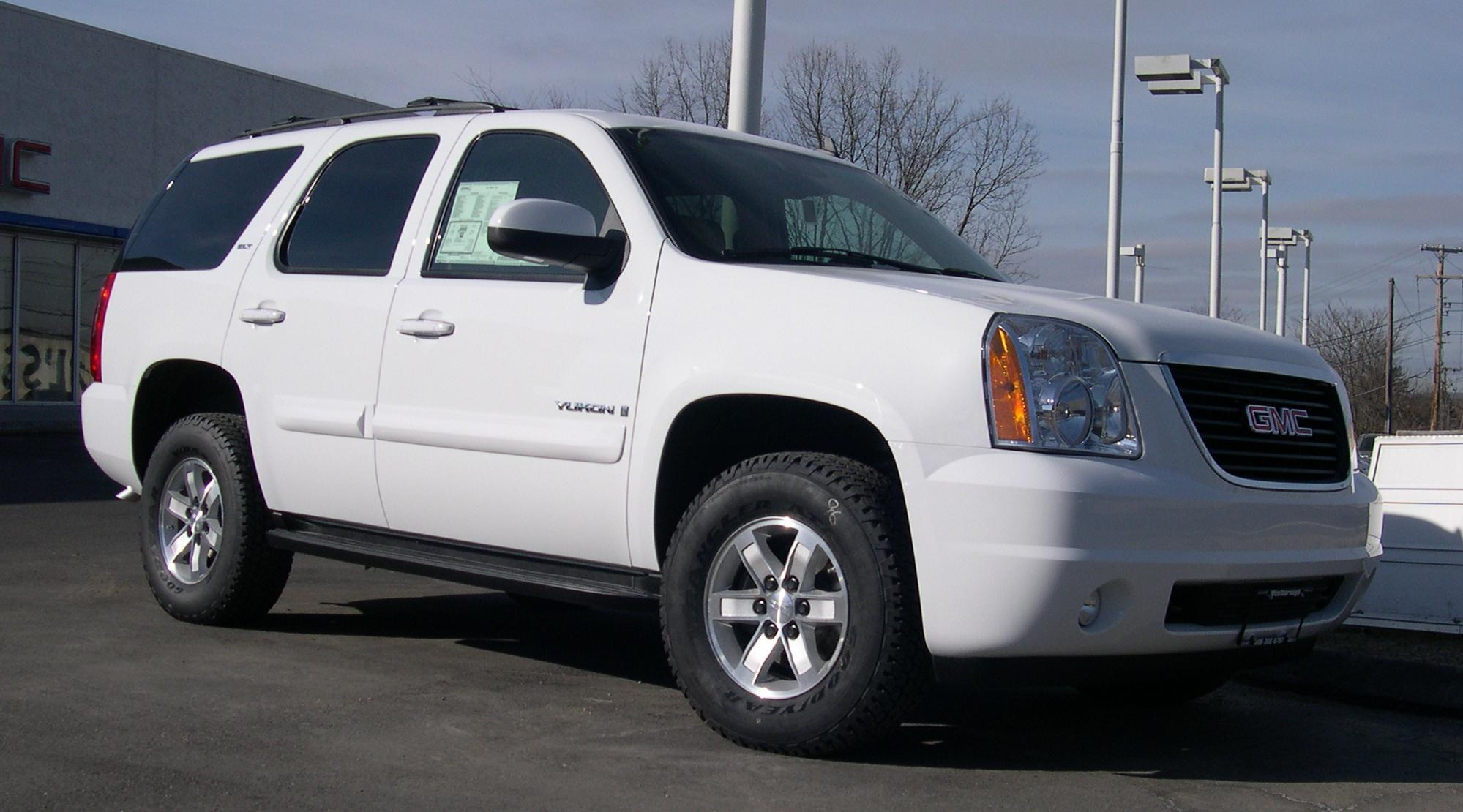 2007 GMT900 GMC Yukon